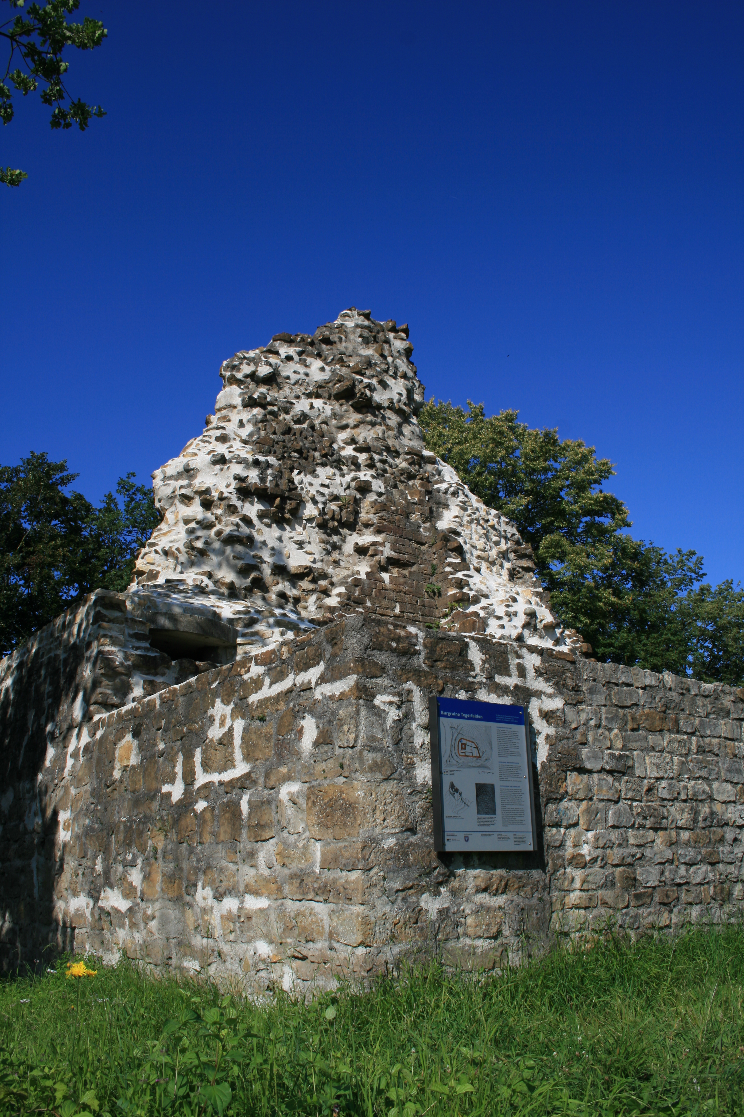 Ruine Tegerfelden, Schweiz